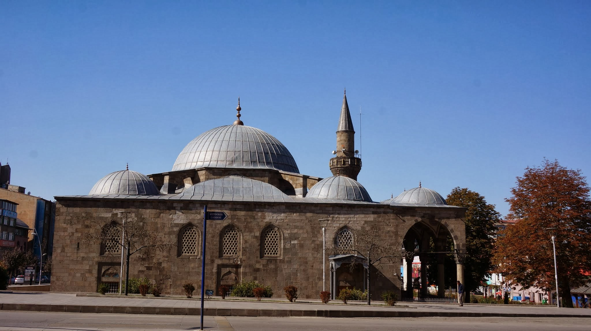 Erzurum, Turkey